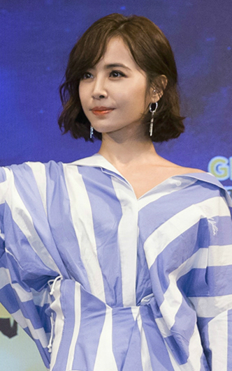 蔡依林Jolin出席王国大帝全球巡回赛现场